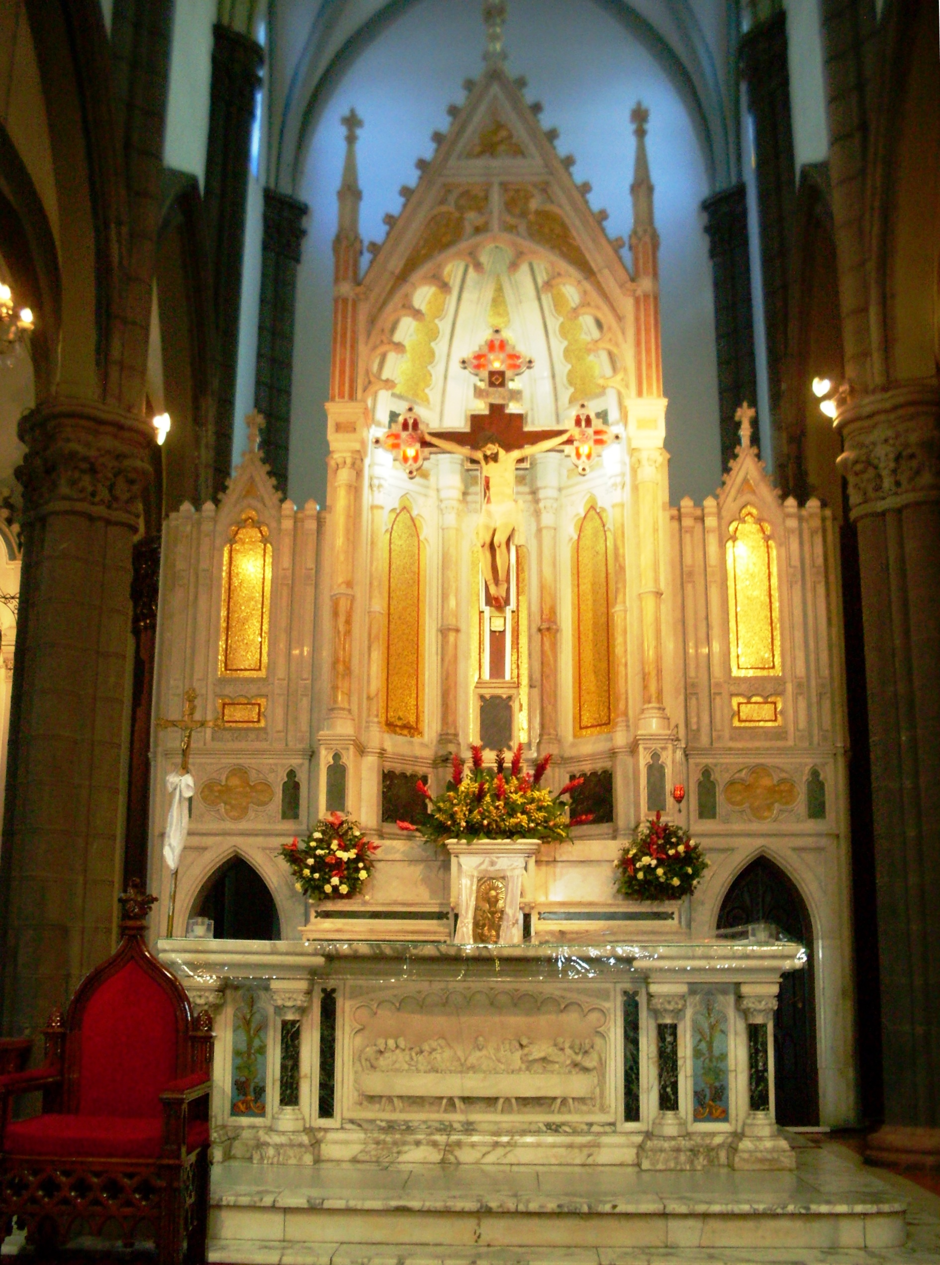 Altar de la Iglesia El Calvario en el centro histórico de San Salvador, El Salvador.